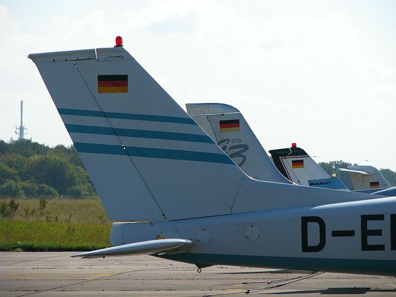 Flugplatz Mainz-Finthen parking positions Foto 2008